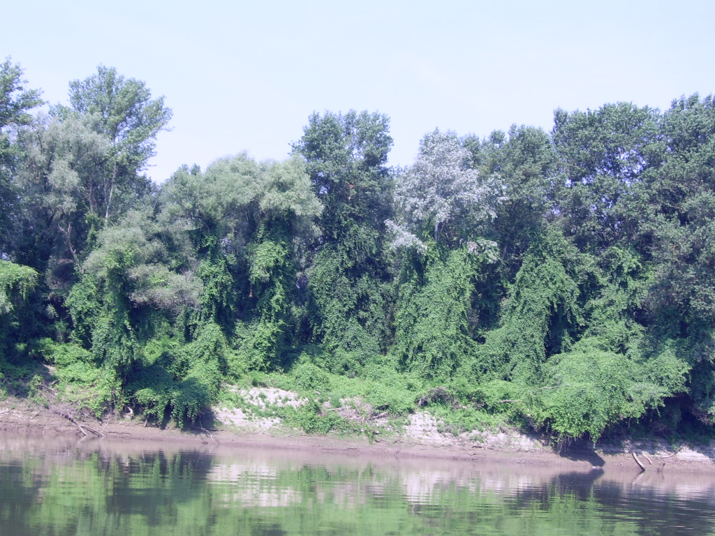 Forest of the Tisza river near Tiszakécske (Hungary) Wald entlang der Tisza in der Nähe von Tiszakécske (Ungarn). Galériaerdő a Tisza mentén Tiszakécske közelében.